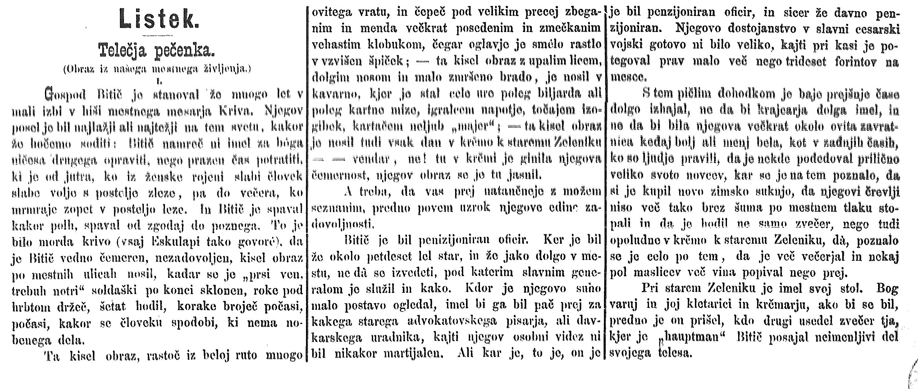 Začetek novele Josipa Jurčiča Telečja pečenka, objavljen 11. aprila 1872 v časopisu Slovenski narod.